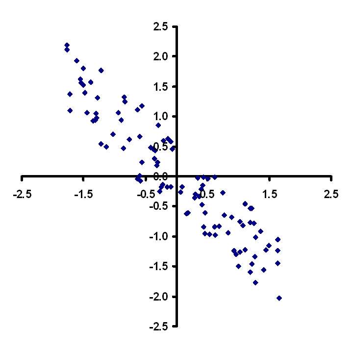 Suite de l'ACP, deux critères fortement corrélés. Jean-Luc W 26 avril 2006 à 02:11 (CEST)